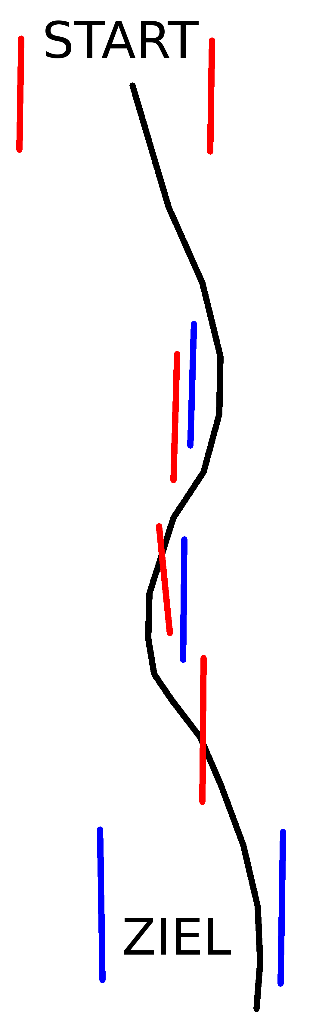 Slalomstangen. Zwecks besserer Sichtbarkeit (Zuschauer, TV) werden beim Slalom (jedoch nicht bei Abfahrt, Super-G und Riesenslalom) die äusseren Stangen oft entfernt. Der Fahrer muss jeweils zwischen der bestehenden und der entfernten Stange durchfahren. Bei vertikalen Toren (hier das zweite rote Tor) wird die zweite Stange nicht entfernt.